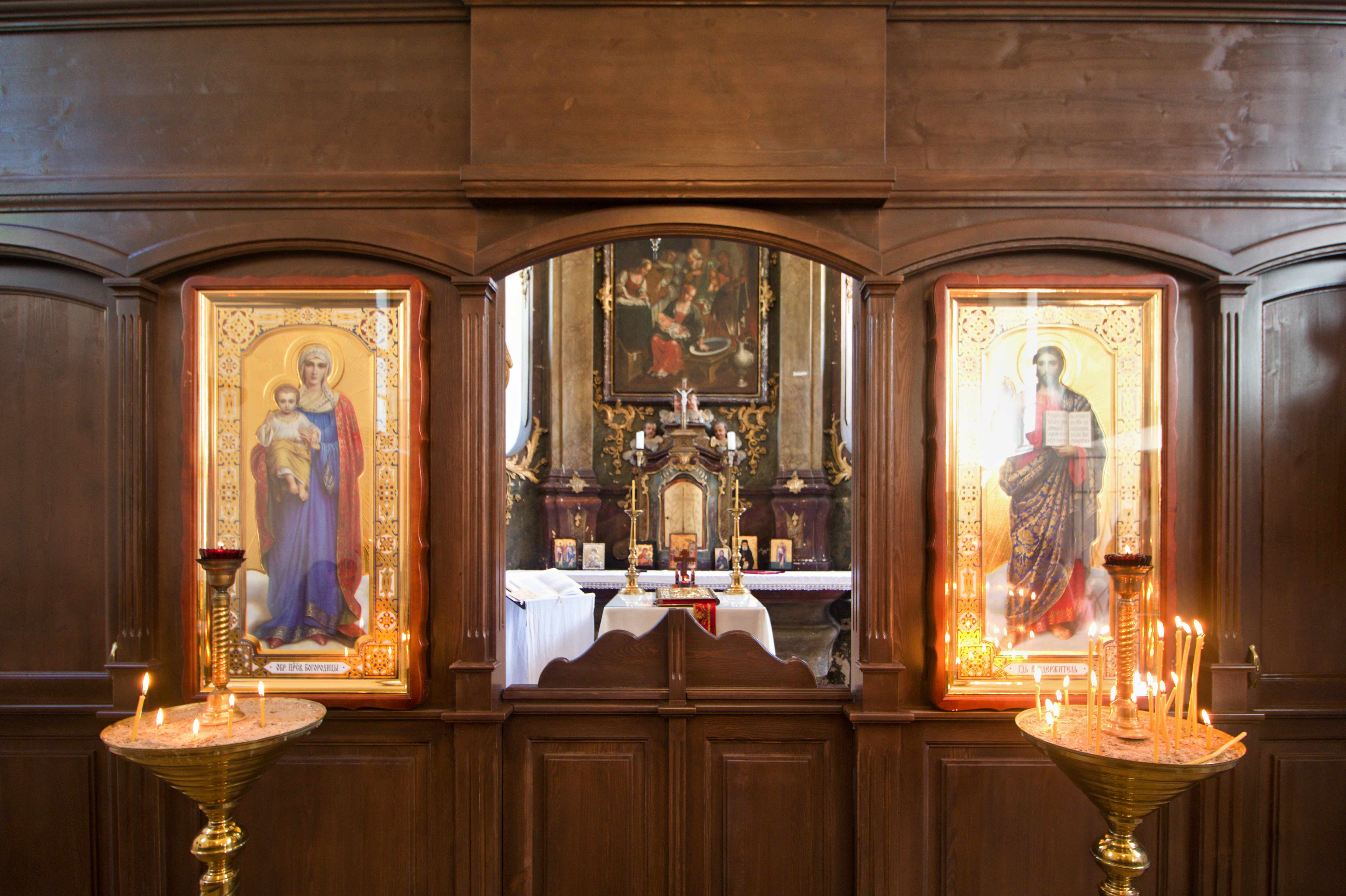 Praha-Malá Chuchle, chrám Narození Panny Marie